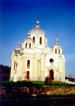 Церква у м. Тухля. 1904 р., архітектор В. Нагірний (1848—1921)